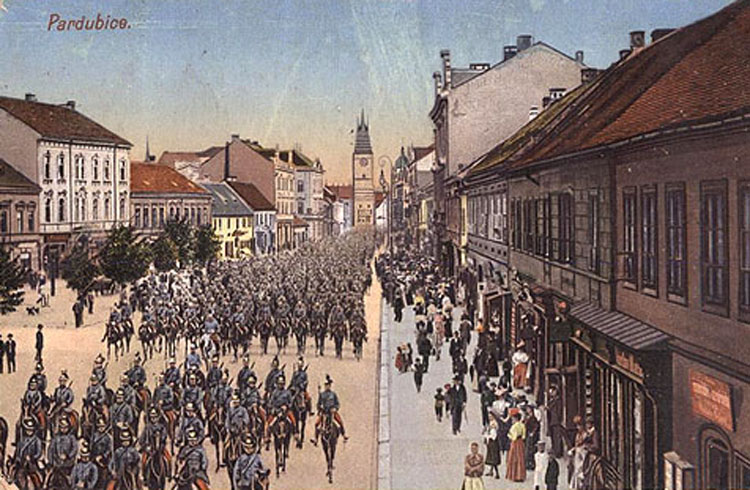 Einzug des k.u.k. Dragoner-regiments Nr. 1 in Pardubitz (Pardubice/CZ)